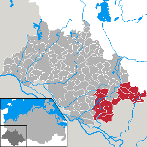 Former Amt Grabow-Land in Mecklenburg-Vorpommern - district Ludwigslust